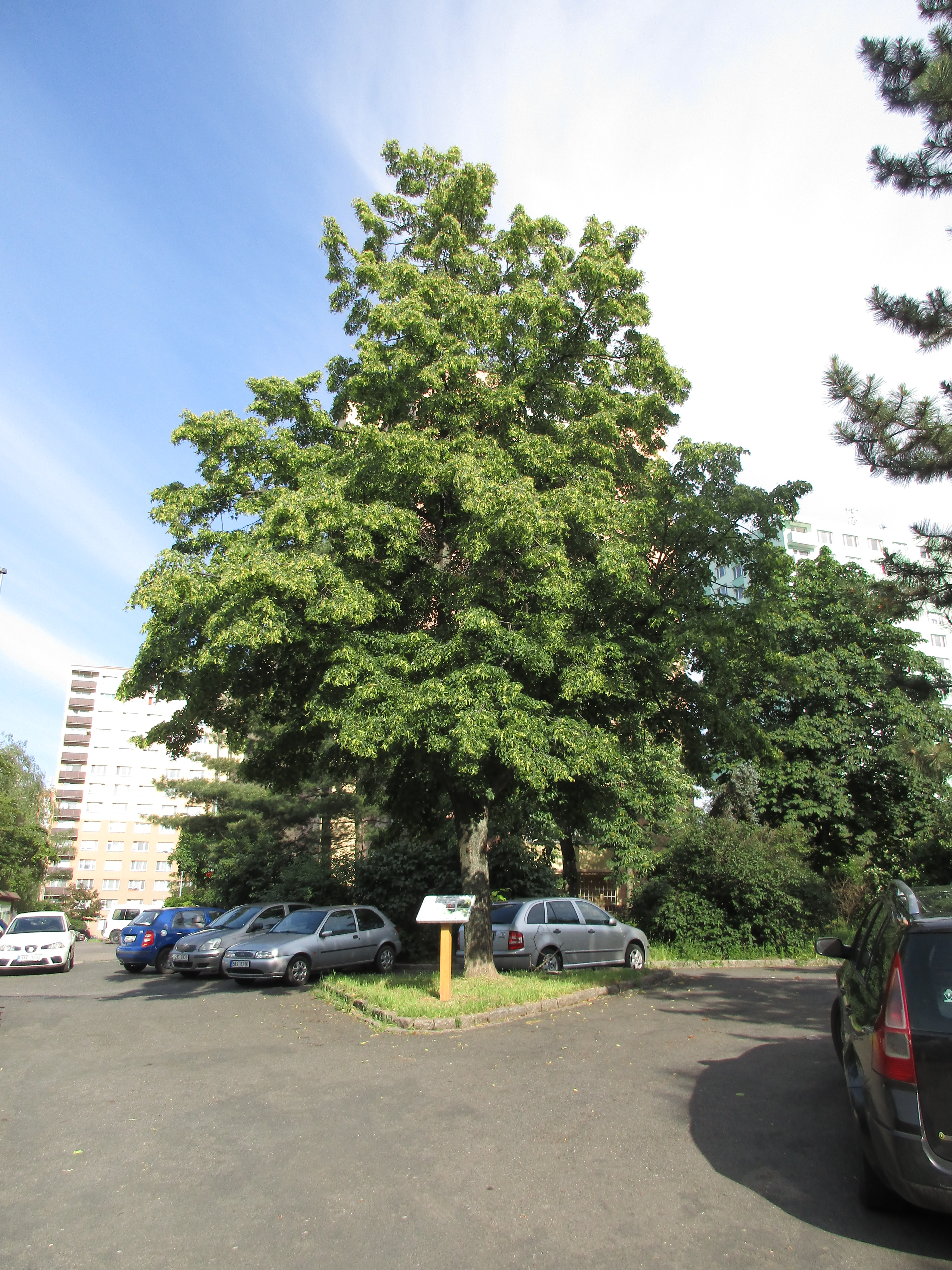 Lípa malolistá (Tilia cordata). Praha 10 - Záběhlice, ulice Slívová. Vysazena roku 1968 na památku 50. výročí vzniku Československé republiky. Významný strom, evidenční číslo MHMP: 55, v databázi od roku 2015.